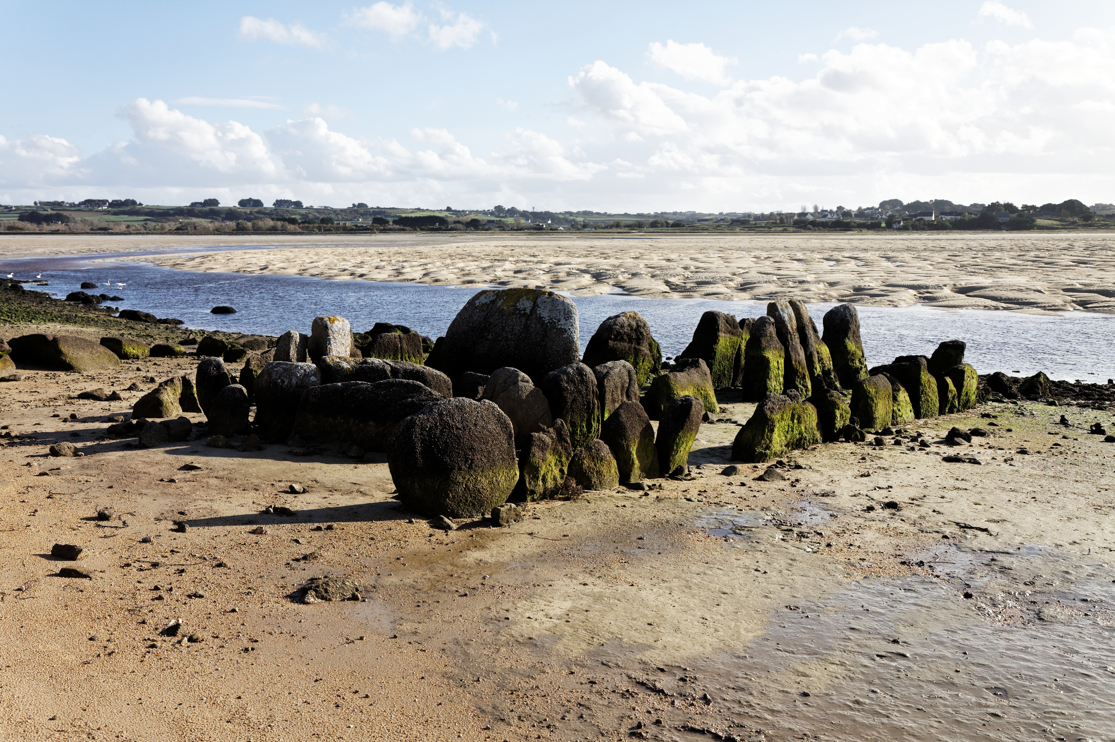 L'allée couverte de Guinirvit à Plouescat dans le Finistère. Elle a la particularité d'être couverte à marée haute et accessible à marée basse.